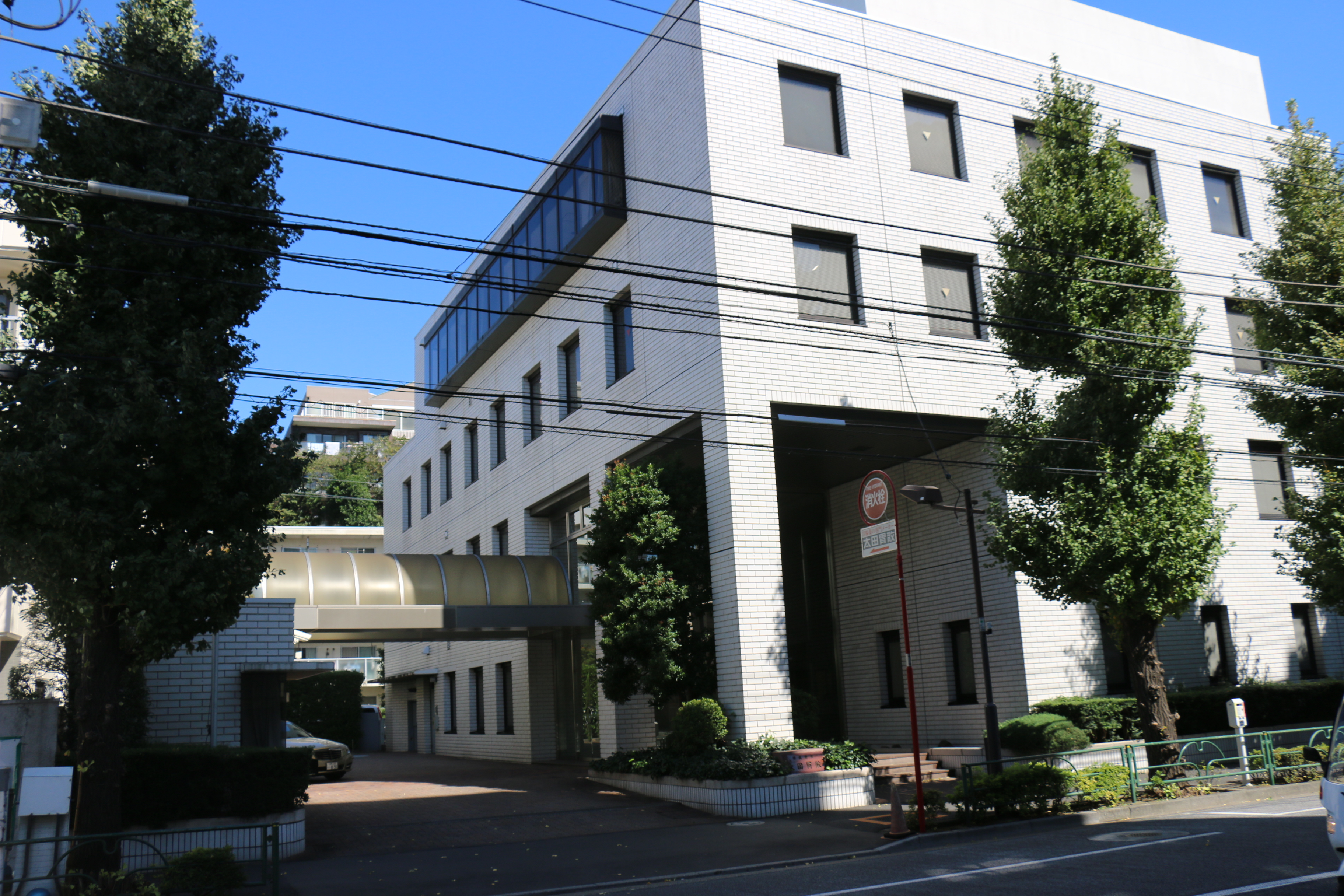 千石の本社ビル